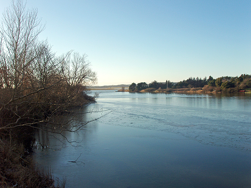 Norsminde Fjord set fra øst ved slusen. Fjorden ligger ca. 20 km syd for Århus, Århus Amt, Jylland, Denmark